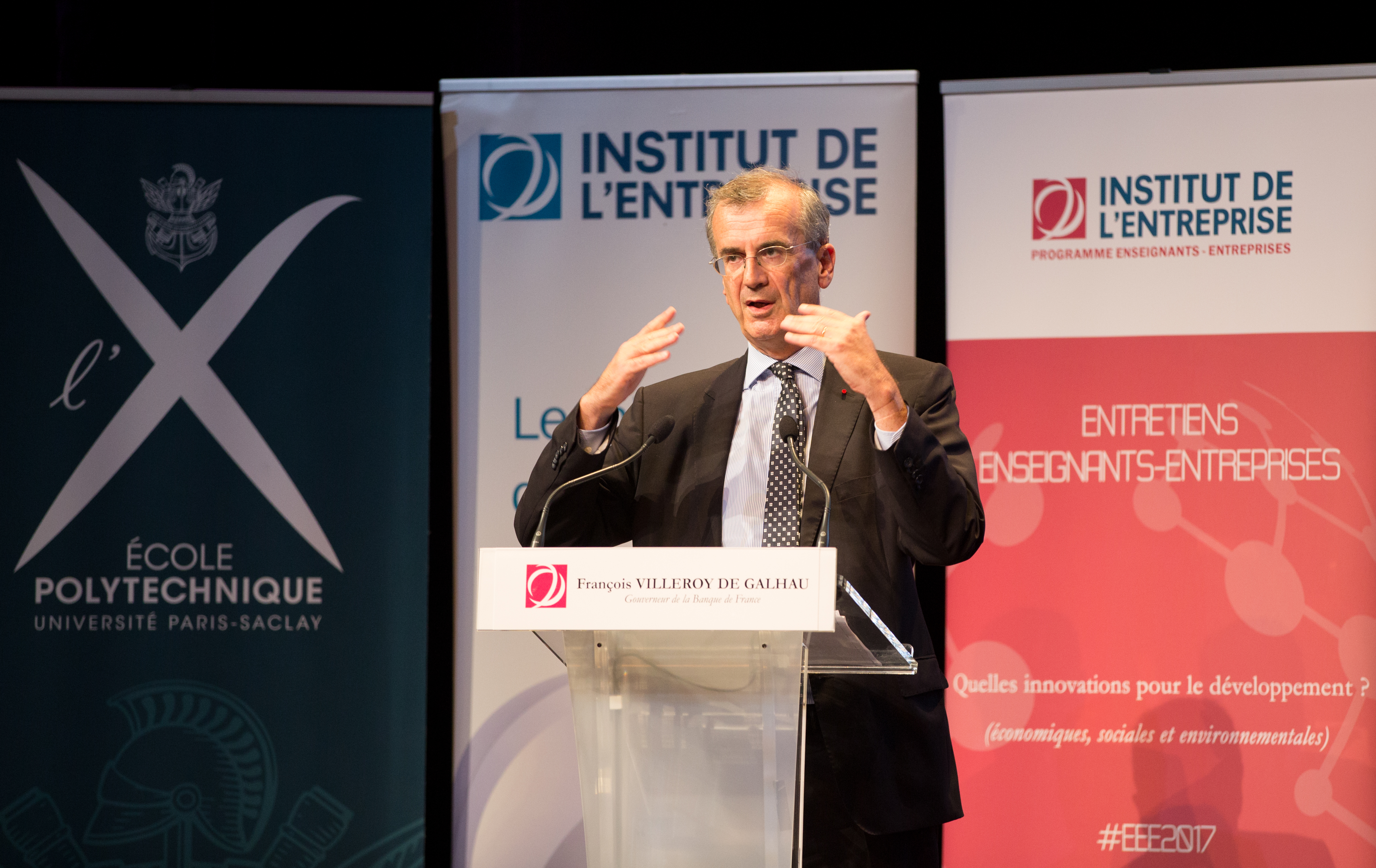 François Villeroy de Galhau - Gouverneur de la Banque de France Conférence : « Comment l’Europe peut-elle conduire ces transitions afin d’améliorer le bien-être et la prospérité de ses citoyens ? »